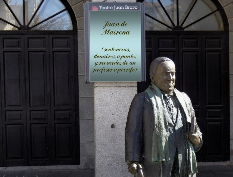 Estatua de Antonio Machado en la plaza mayor de Segovia.